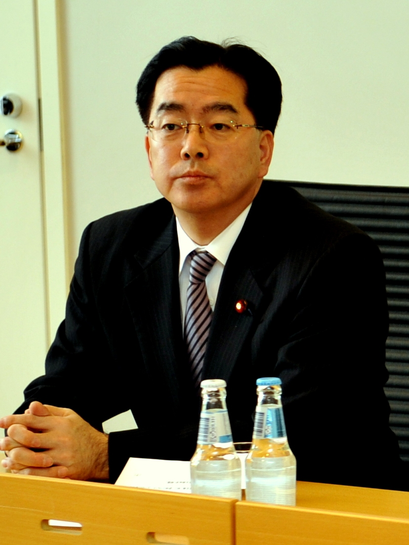 Japanese Deputy Foreign Minister Yutaka Banno.